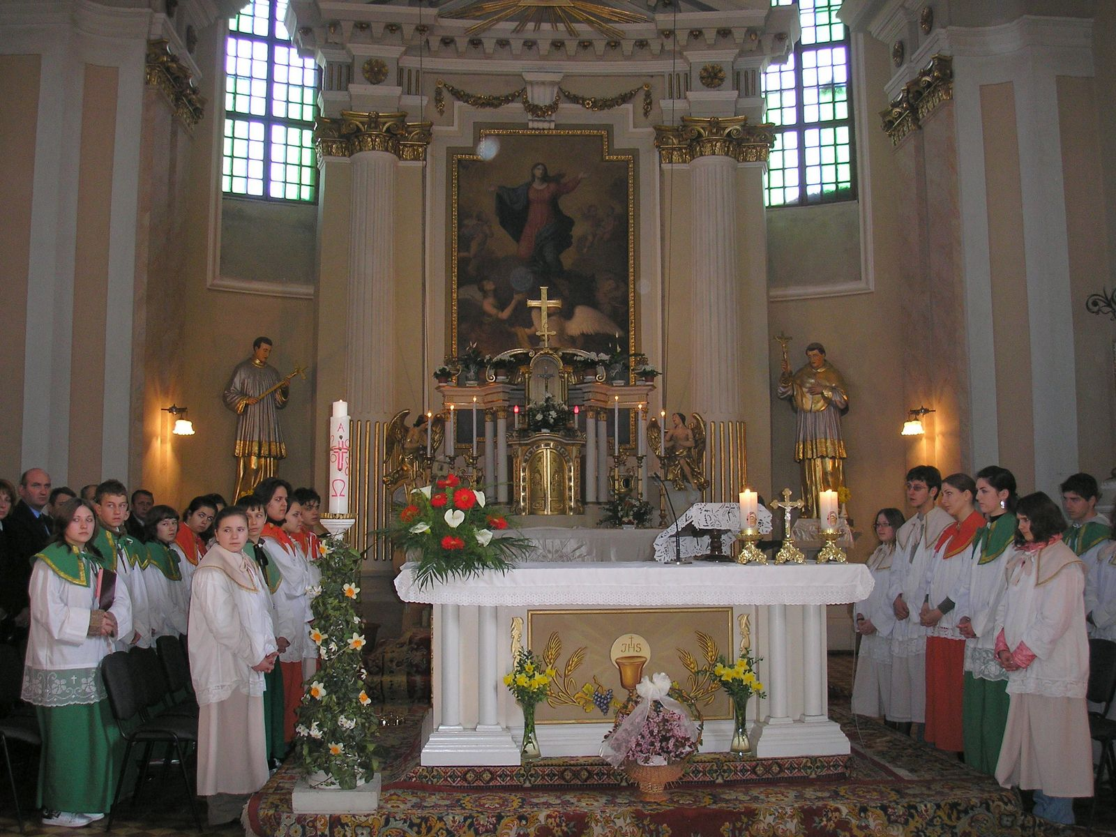 Mass in Dudeştii Vechi